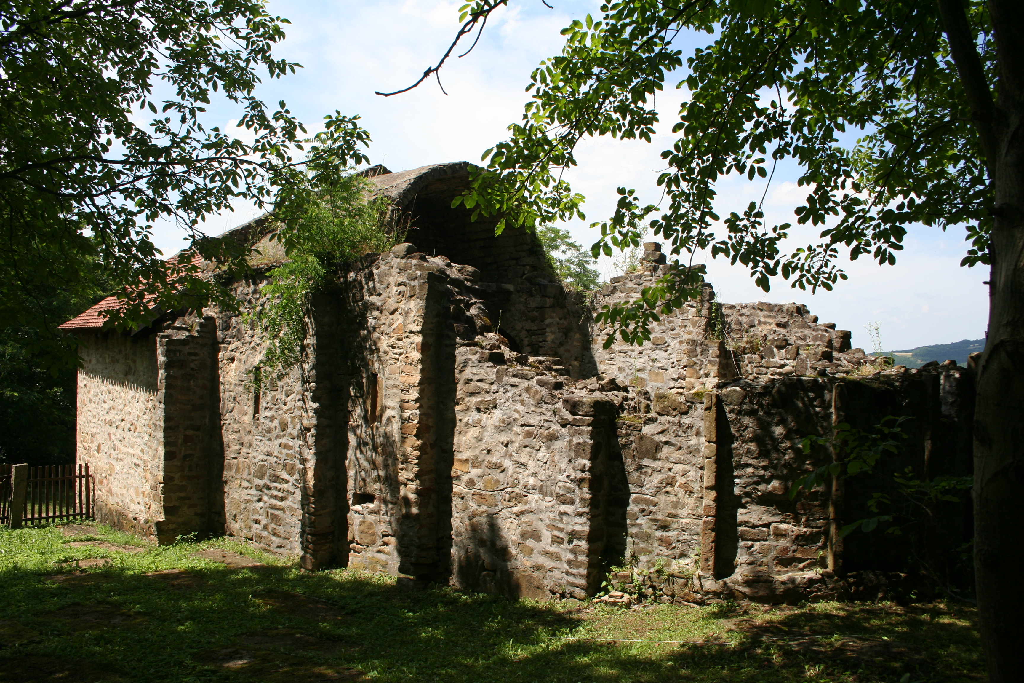 Ostaci manastira Vavedenja Presvete Bogorodice, Slavkovica